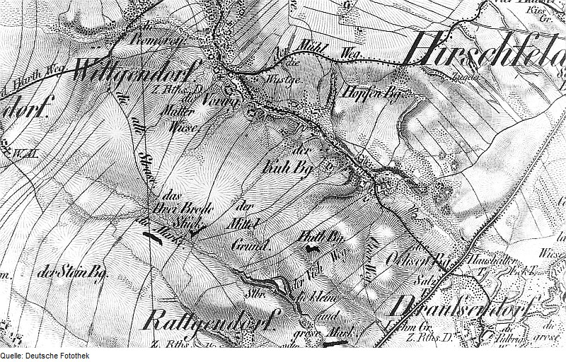 Original image description from the Deutsche Fotothek Hirschfelde-Wittgendorf. Oberreit, Sect. Zittau, 1844/46